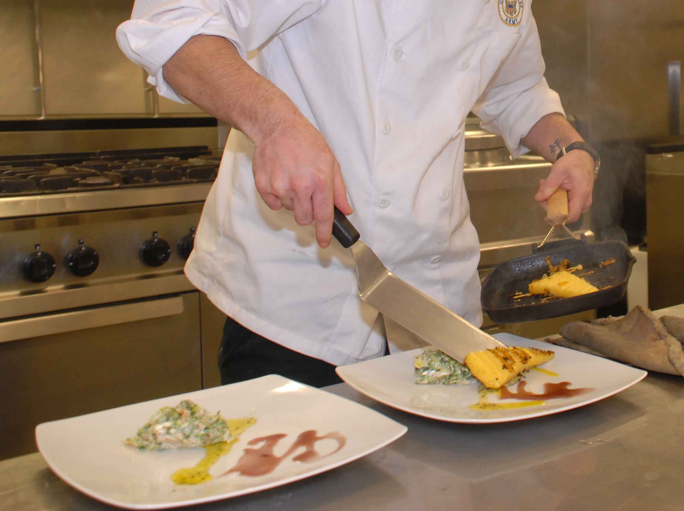 Anrichten – hier Hinzufügen von gebratenen Polenta-Scheiben zu den einzelnen Esstellern, auf denen sich bereits je eine Portion gegarter Kohl sowie zwei verschiedene Saucen befinden. (Anmerkung: Danach wird das Gericht dann noch durch je ein gebratenes Schweineschnitzel und eine Auflage aus gebackenen Zwiebelringen vervollständigt werden.)